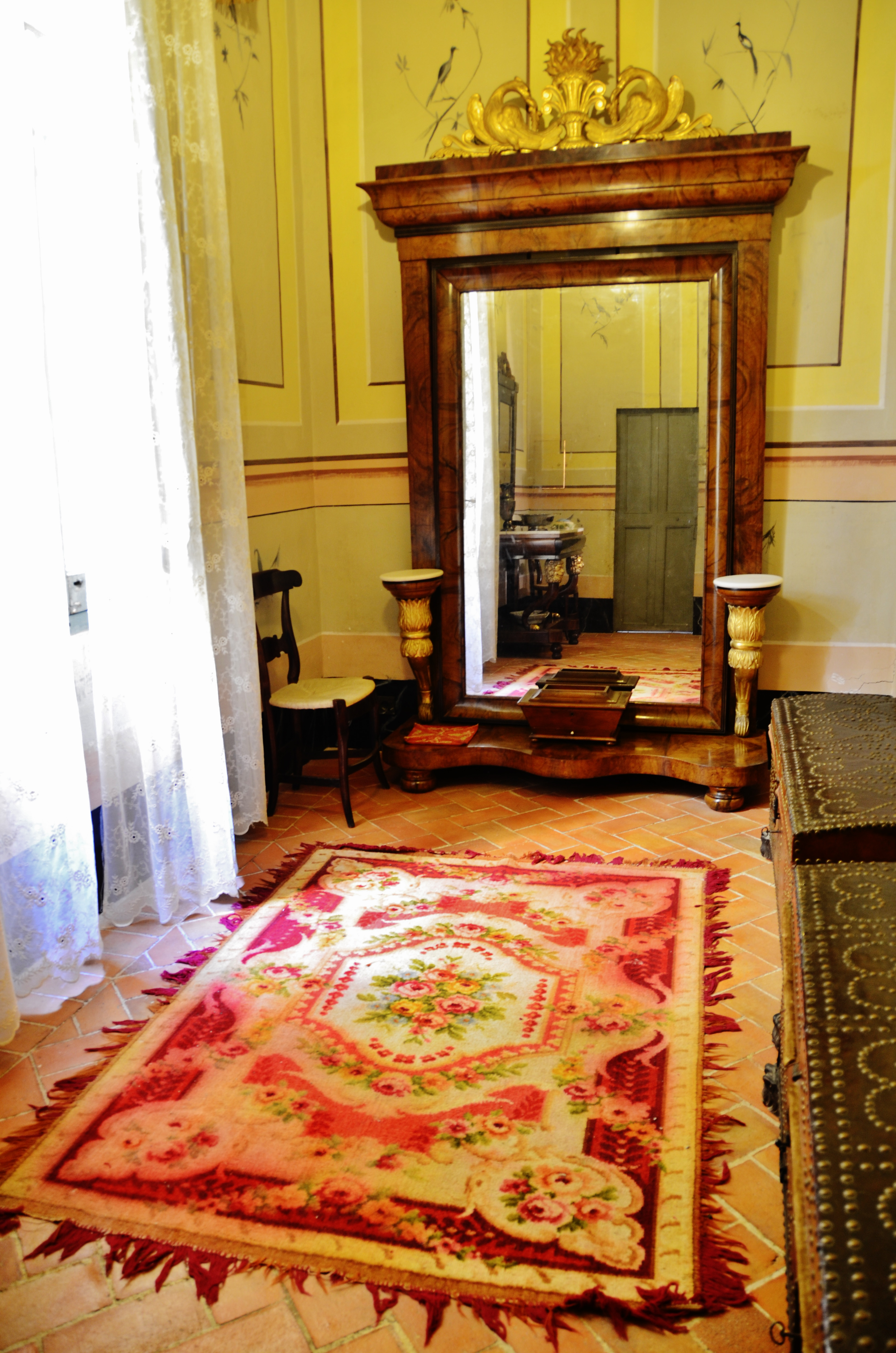 Interior del vestidor Imperi del Museu Romàntic Can Papiol, Vilanova i la Geltrú (Catalonia).